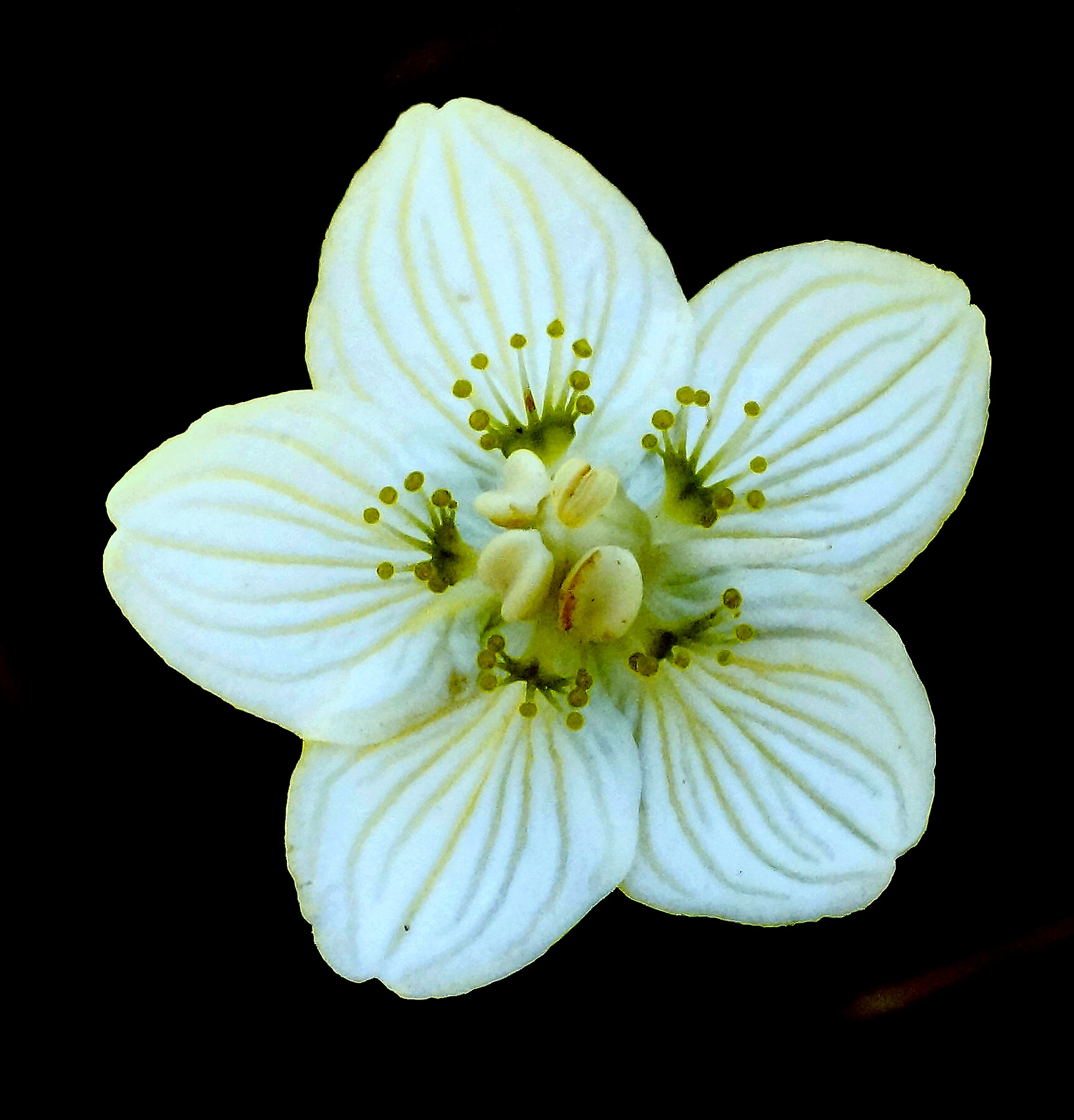 Sumpf-Herzblatt, Parnassiaceae, Deutschland, Oberbayern, Mittenwald, Ferchensee, 1000 m Photo: U.Schmidt, 28.VIII.2012